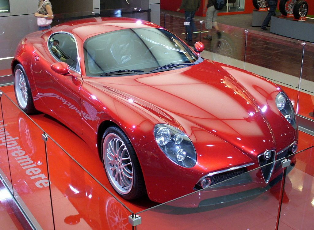 Alfa Romeo 8C Competizione